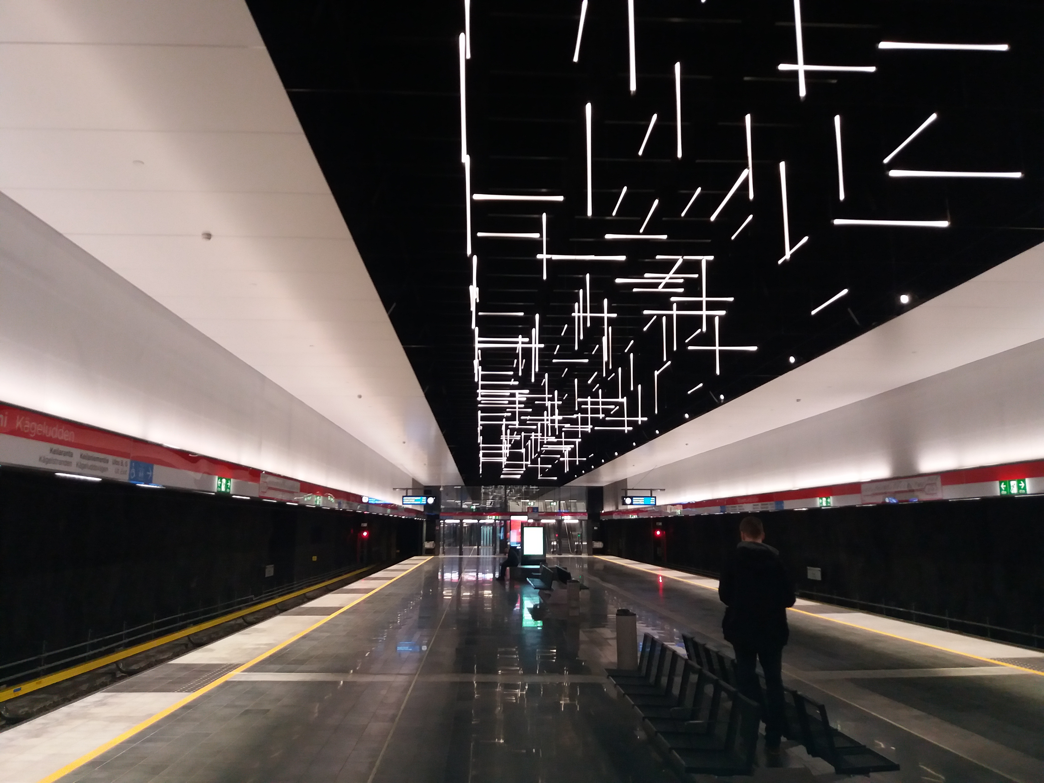 Keilaniemen metroasema avajaispäivänään.